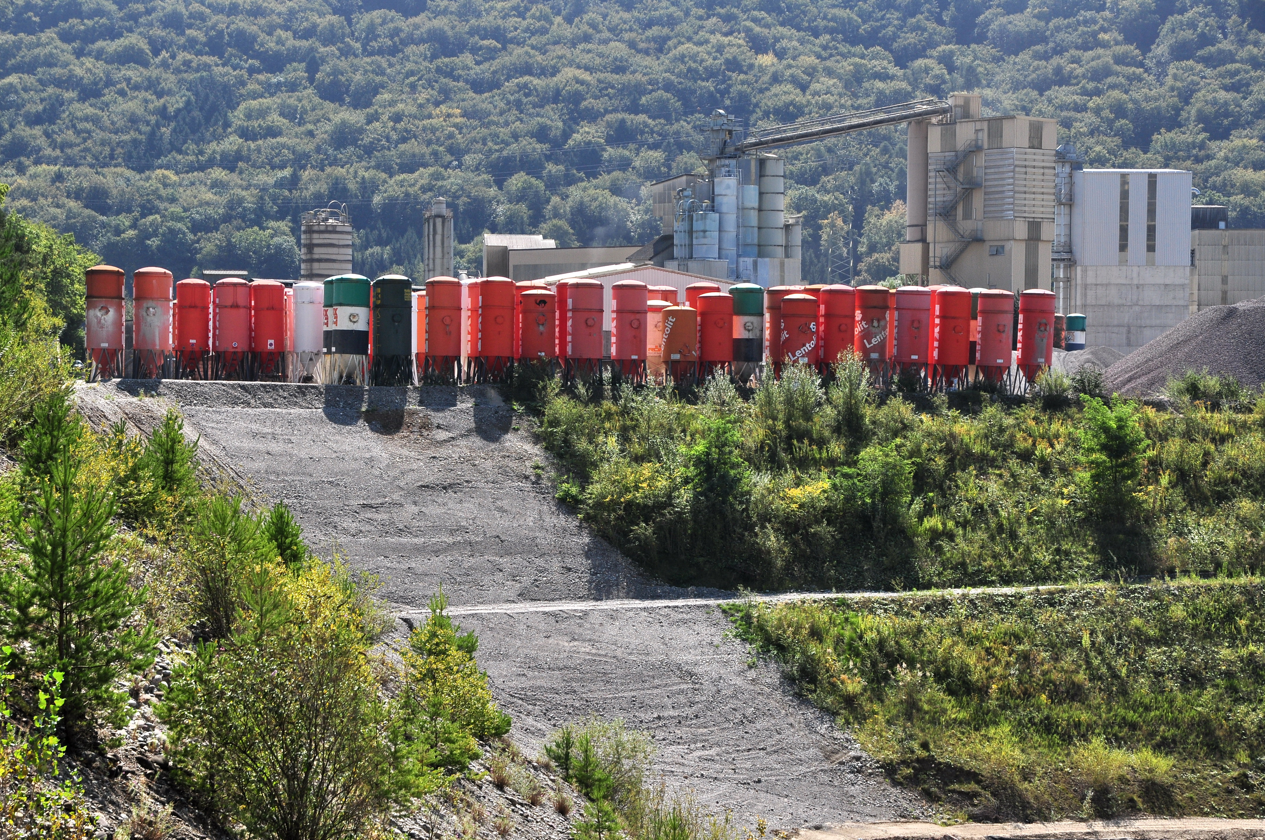 Weiacher Kies AG in Weiach (Switzerland)